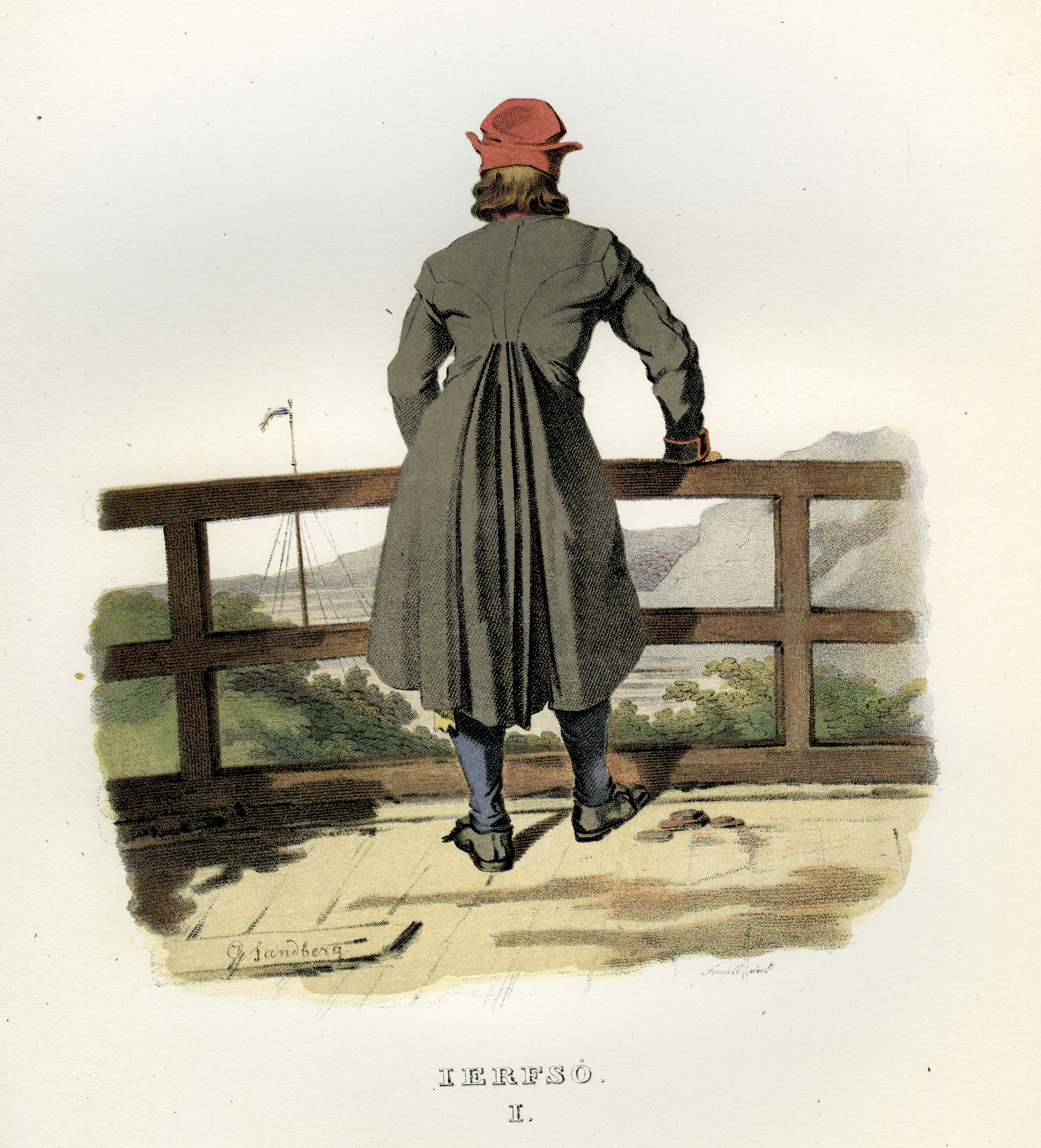 Folkdräkt från Järvsö, Hälsingland, Sverige. Illustration ur Ett år i Sverige. Taflor af Svenska Almogens klädedrägt, lefnadssätt och hemseder, samt de för landets historia märkvärdigaste orter (1864) tecknade av Johan Gustaf Sandberg.